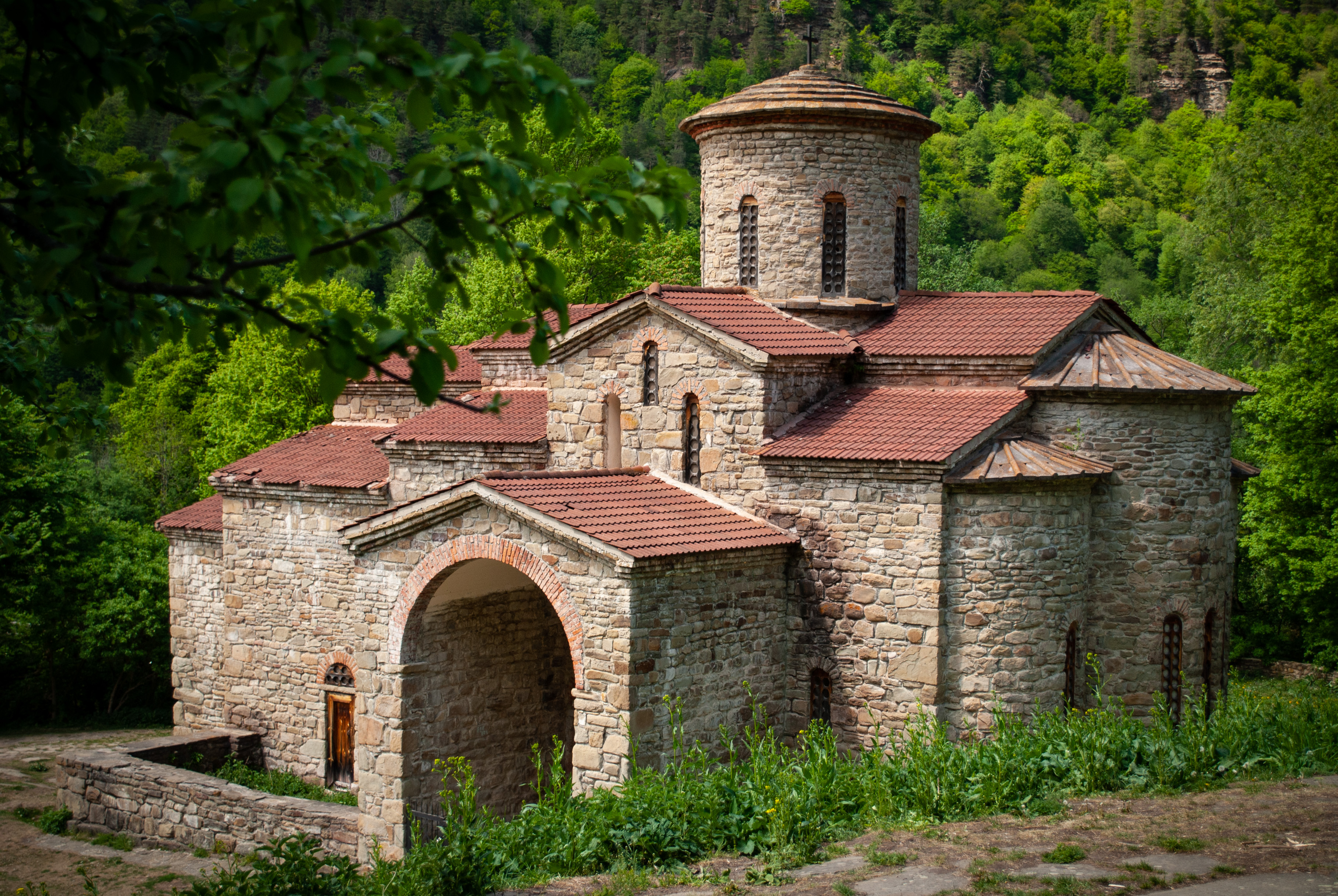 Каньон реки Большой Зеленчук: Зеленчукский район, Карачаево-Черкесия This image is related to the protected area of Russia number 0910008